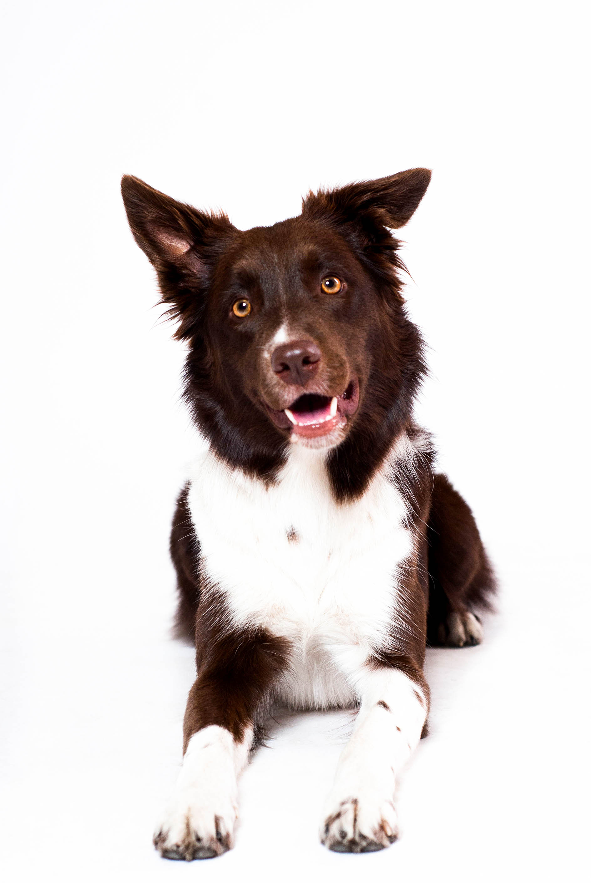 Red border collie